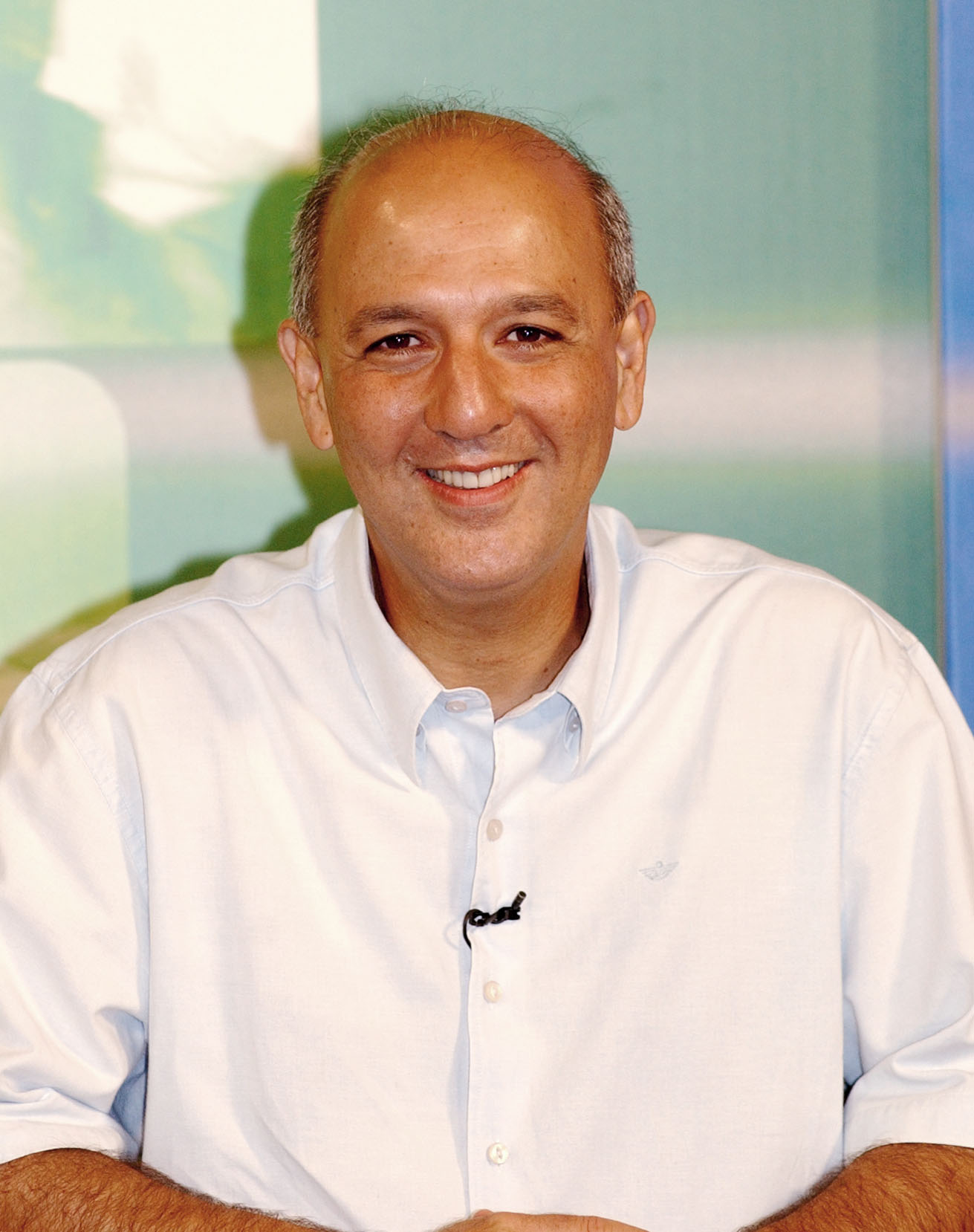 Brasília - O deputado Federal, José Roberto Arruda, concede entrevista ao Canal NBr. Foto J. Freitas/ABr.